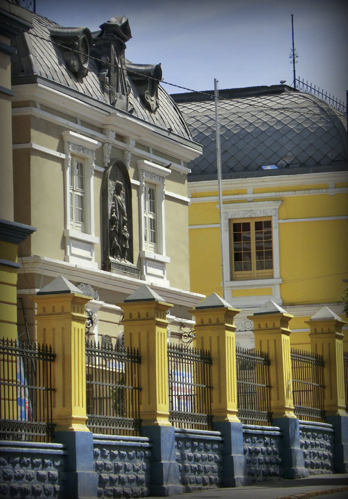 Arquitectura francesa en Arequipa